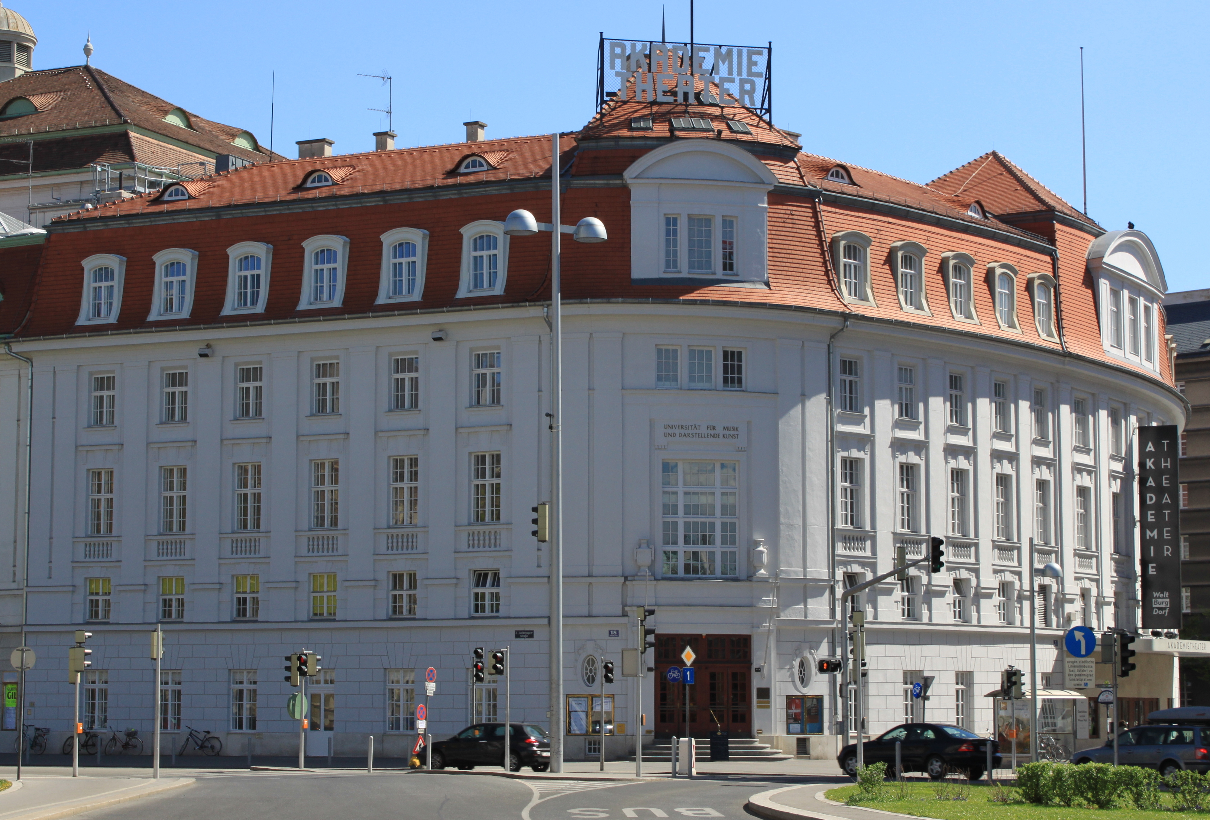 Institutsgebäude und ehem. Hauptgebäude der Universität für Musik und darstellende Kunst Wien samt Akademietheater, Lothringerstraße 18